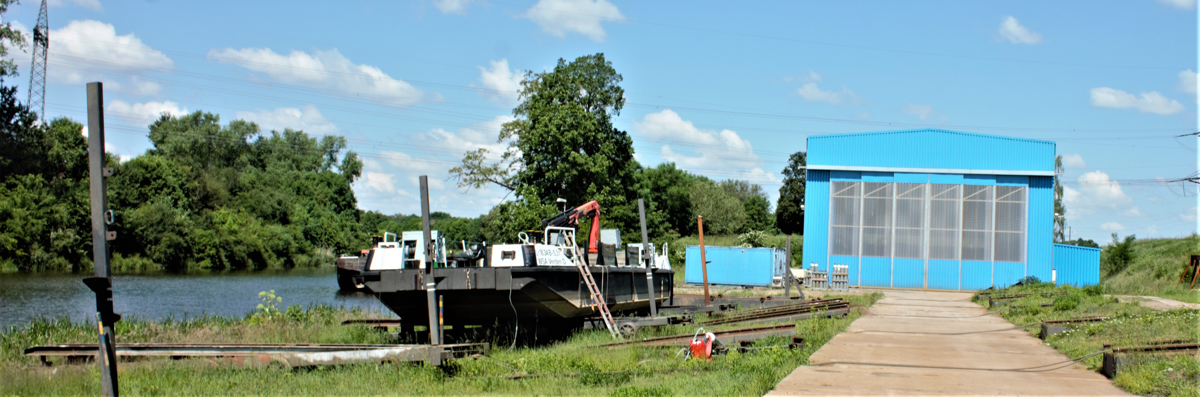 Slip